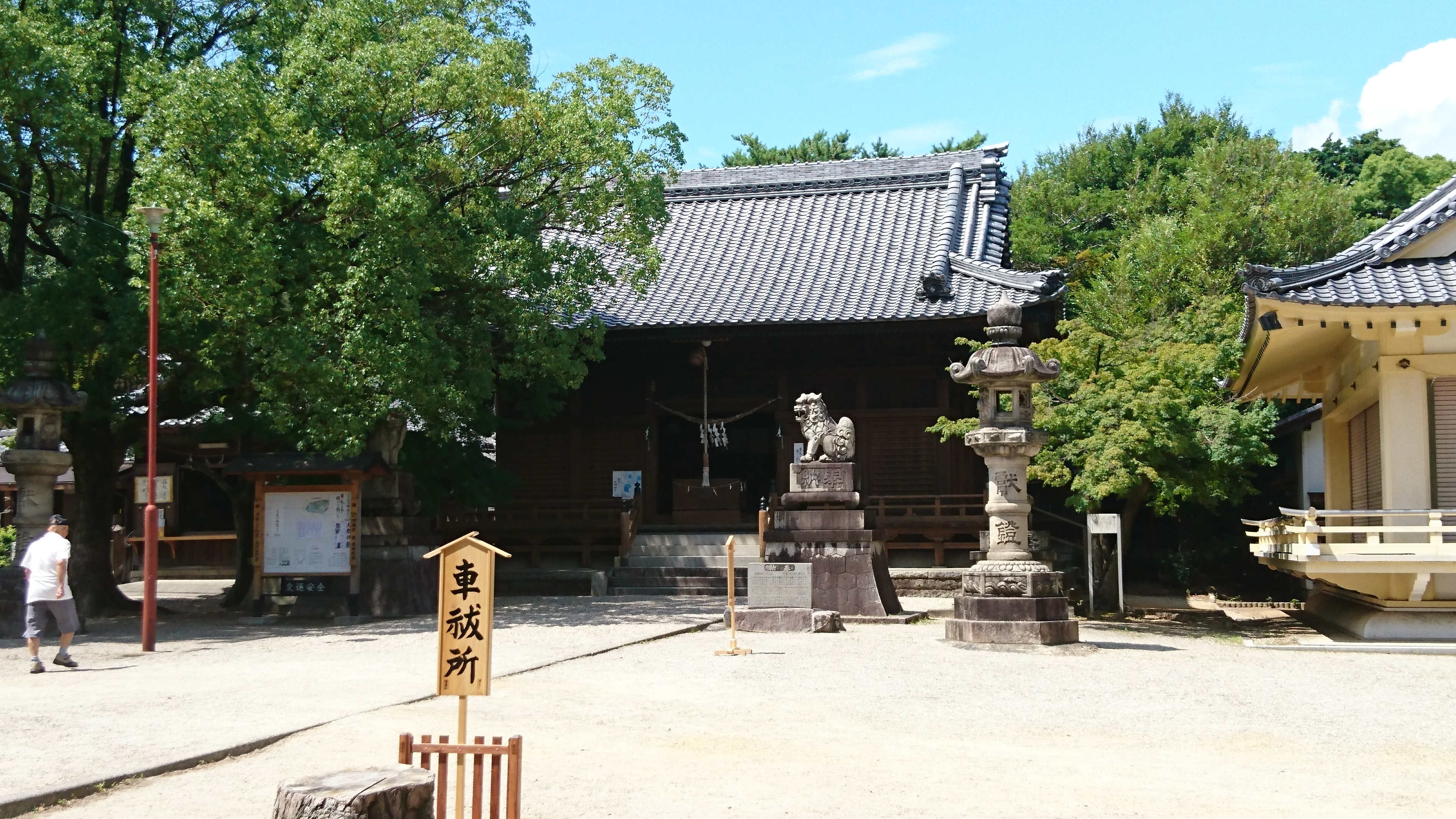 春日神社拝殿